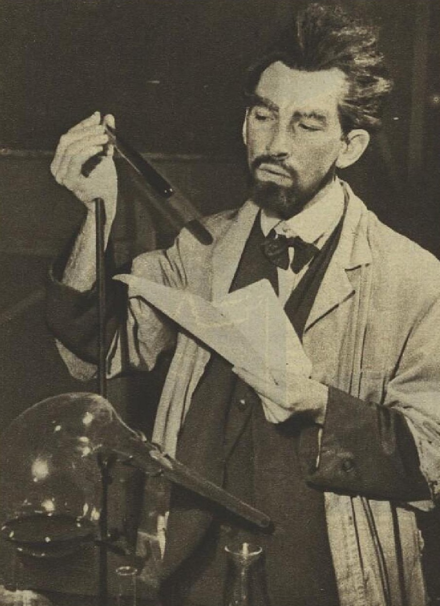 Luděk Kopřiva (1924-2004), český herec